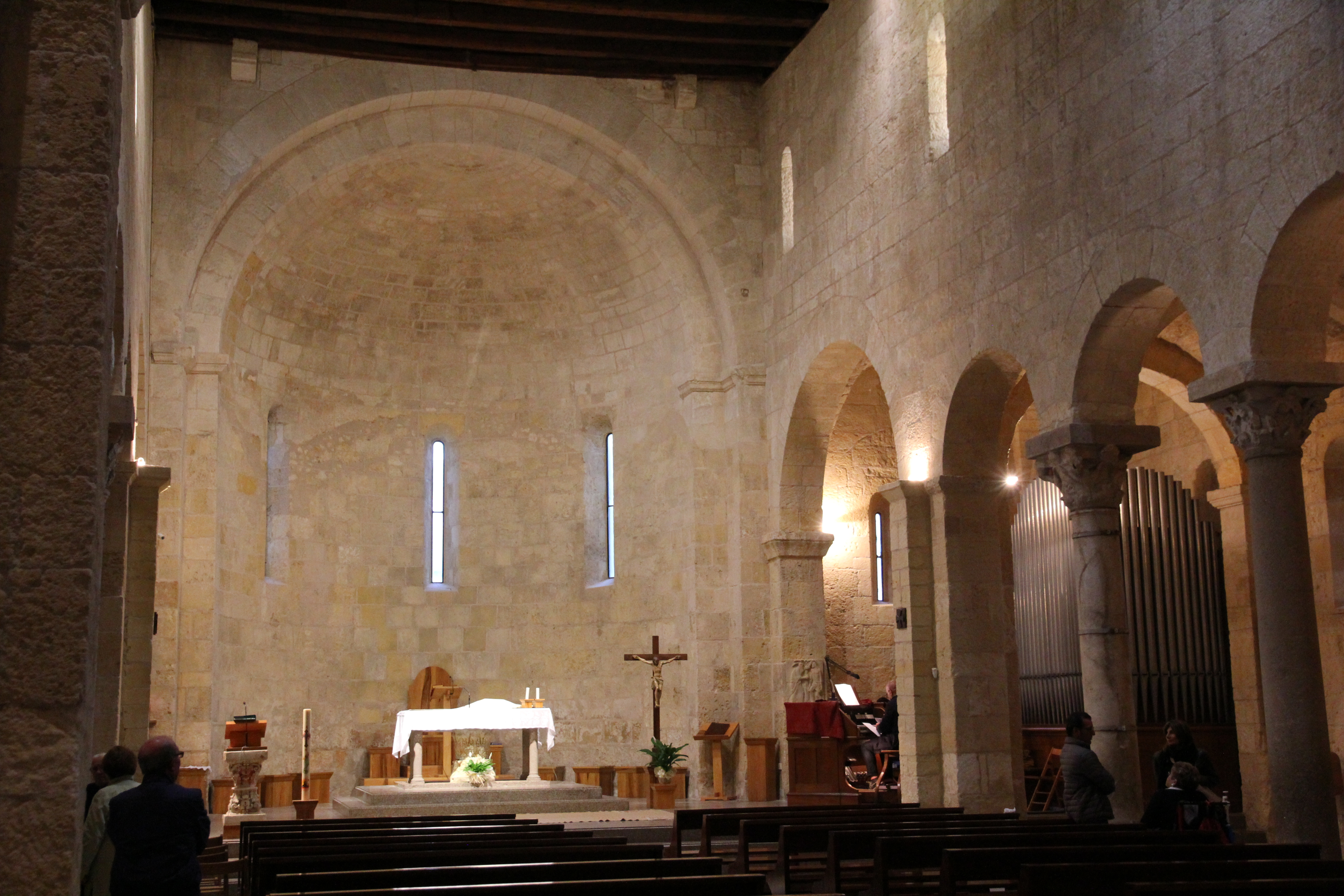 Porto Torres - Basilica romanica di San Gavino